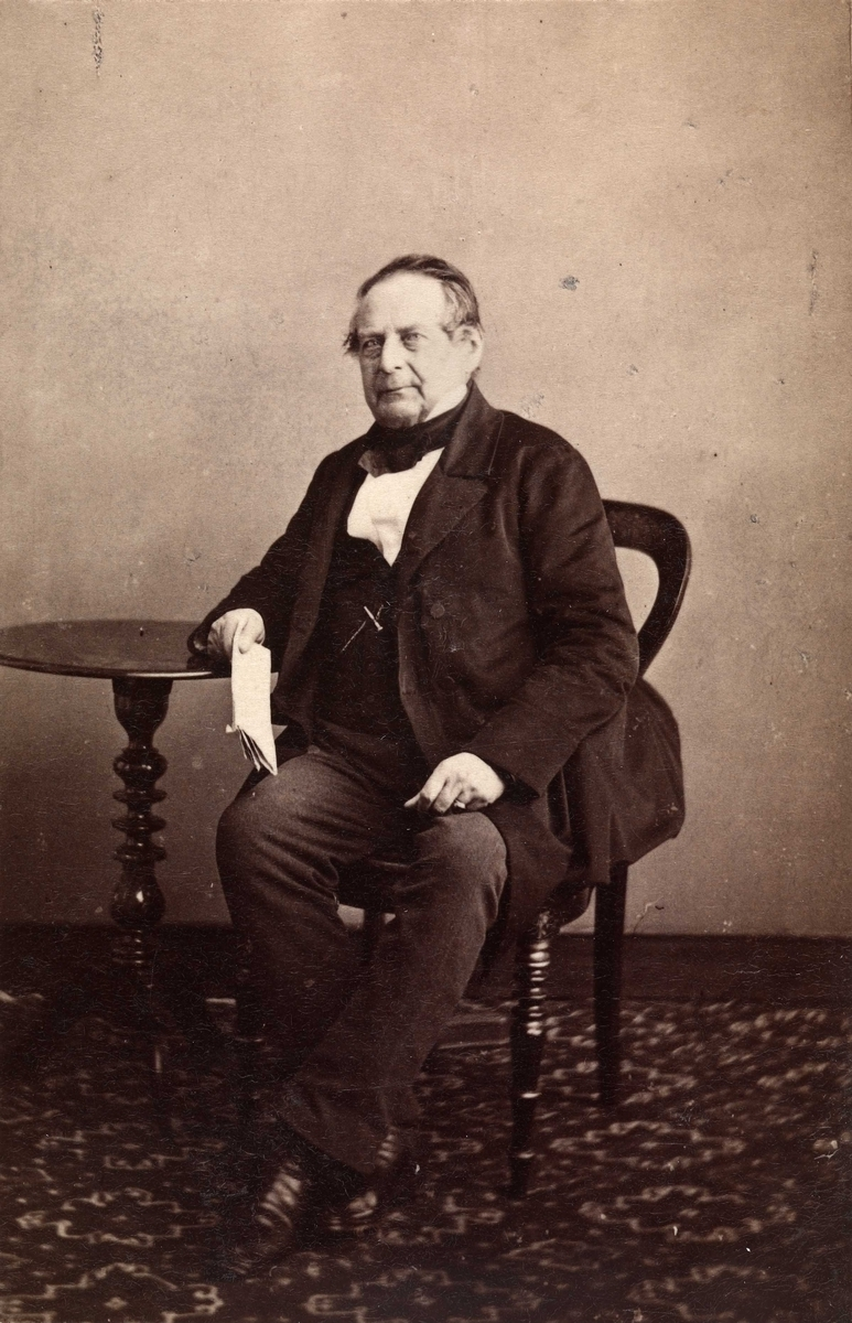 Den norske høyesterettsadvokaen og revisjonsministeren Hans Christian Petersen (1793-1862)